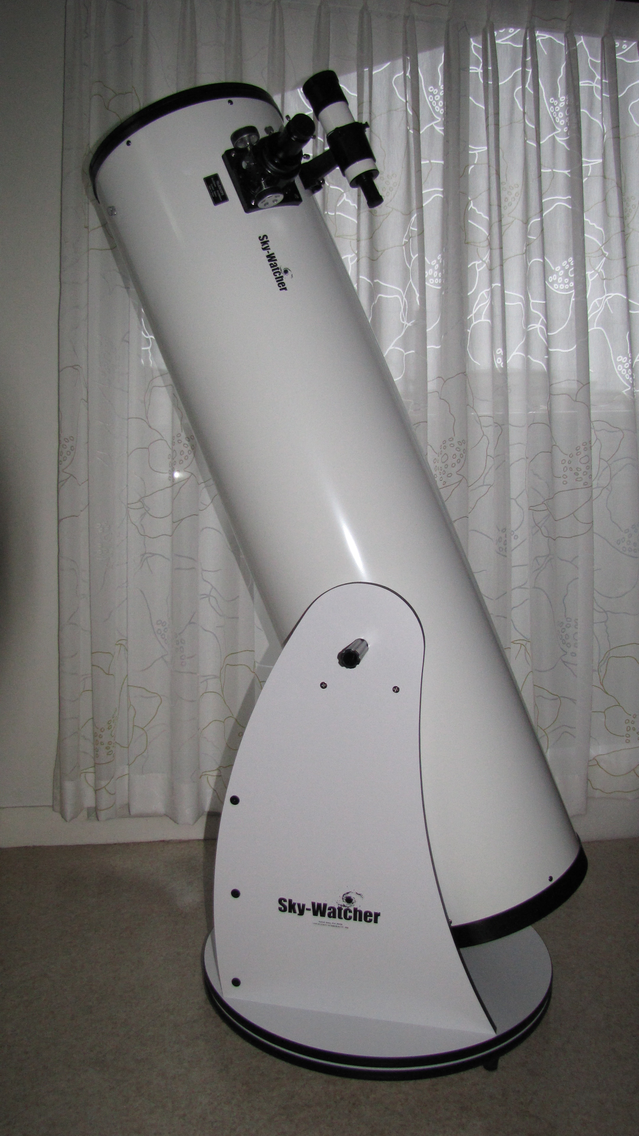 Dobson 12 pouces de marque Sky-Watcher